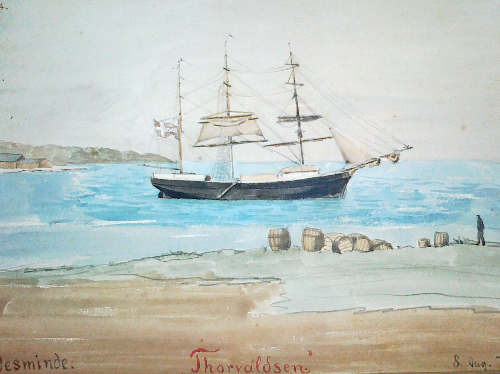 "Egedesminde "Thorvaldsen". Tegning af Andreas Kornerup, 8 aug. 1879.